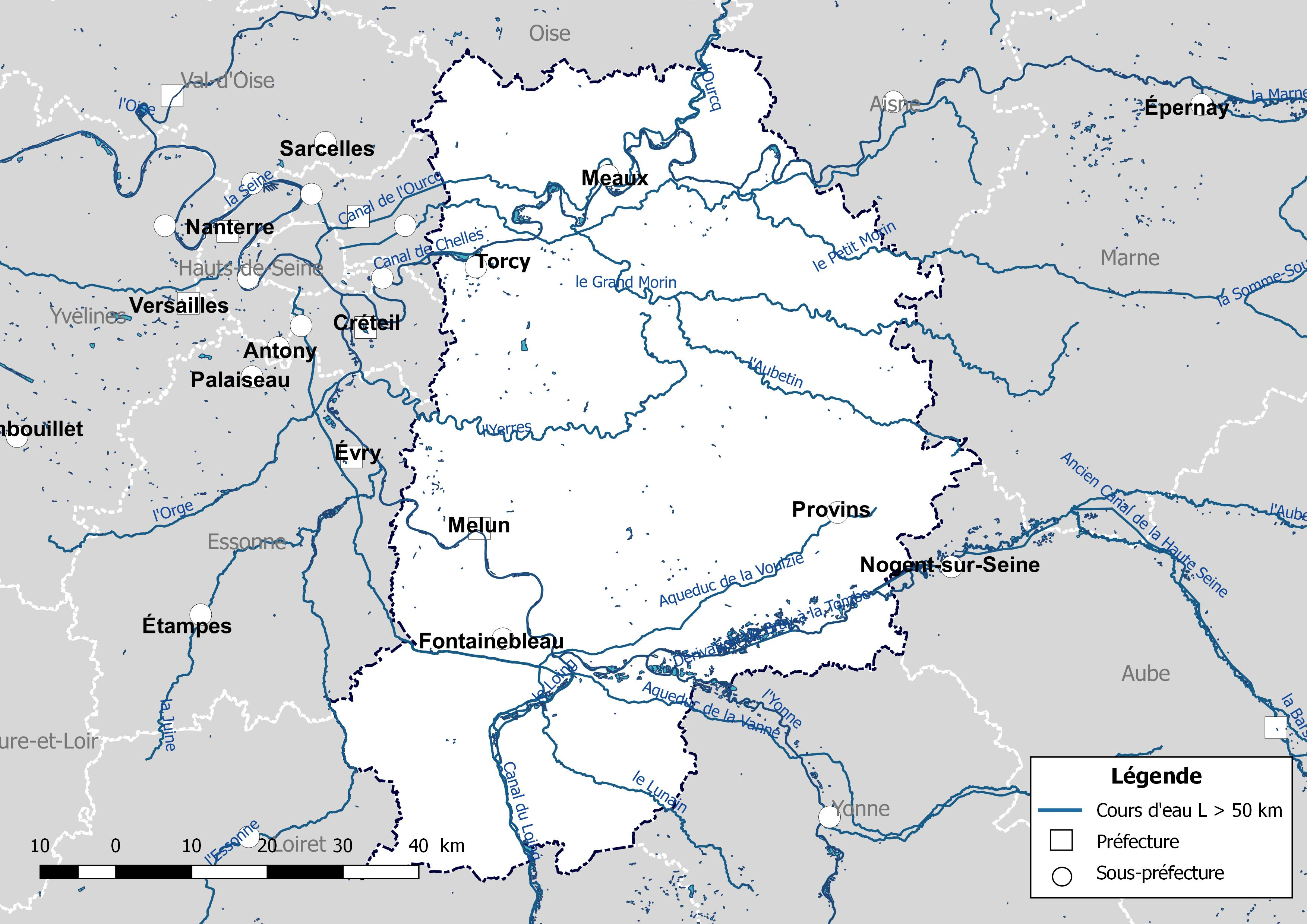 Carte des cours d'eau de longueur supérieure à 50 km drainant le département de la Seine-et-Marne (France).